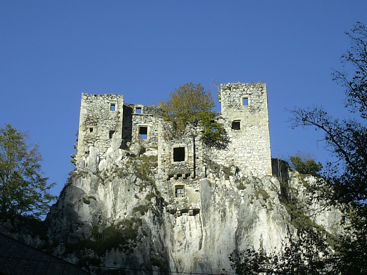 Burgruine Schachenstein in Thörl/Österreich.